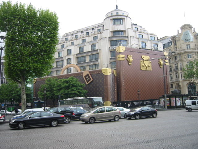 Boutique Louis Vuitton - Champs-Élysées - Paris